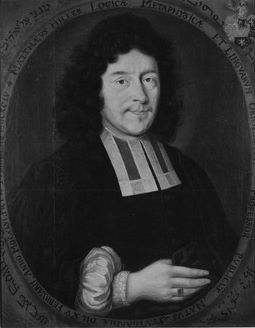 Bild in der Tübinger Professorengalerie